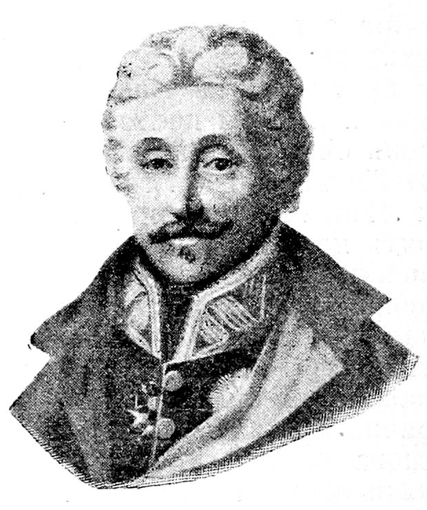 Это изображение было использовано для иллюстрирования статьи «Зайончек, Иосиф, князь» опубликованной в десятом томе «Военной энциклопедии», который был издан книгоиздательским товариществом И. Д. Сытина в 1912—1913 гг. в столице Российской империи городе Санкт-Петербурге.